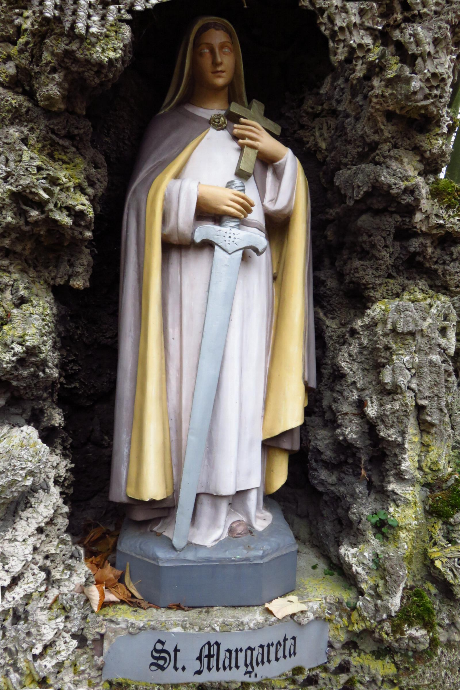 Grottenanlage in Hehn Heiligenpesch